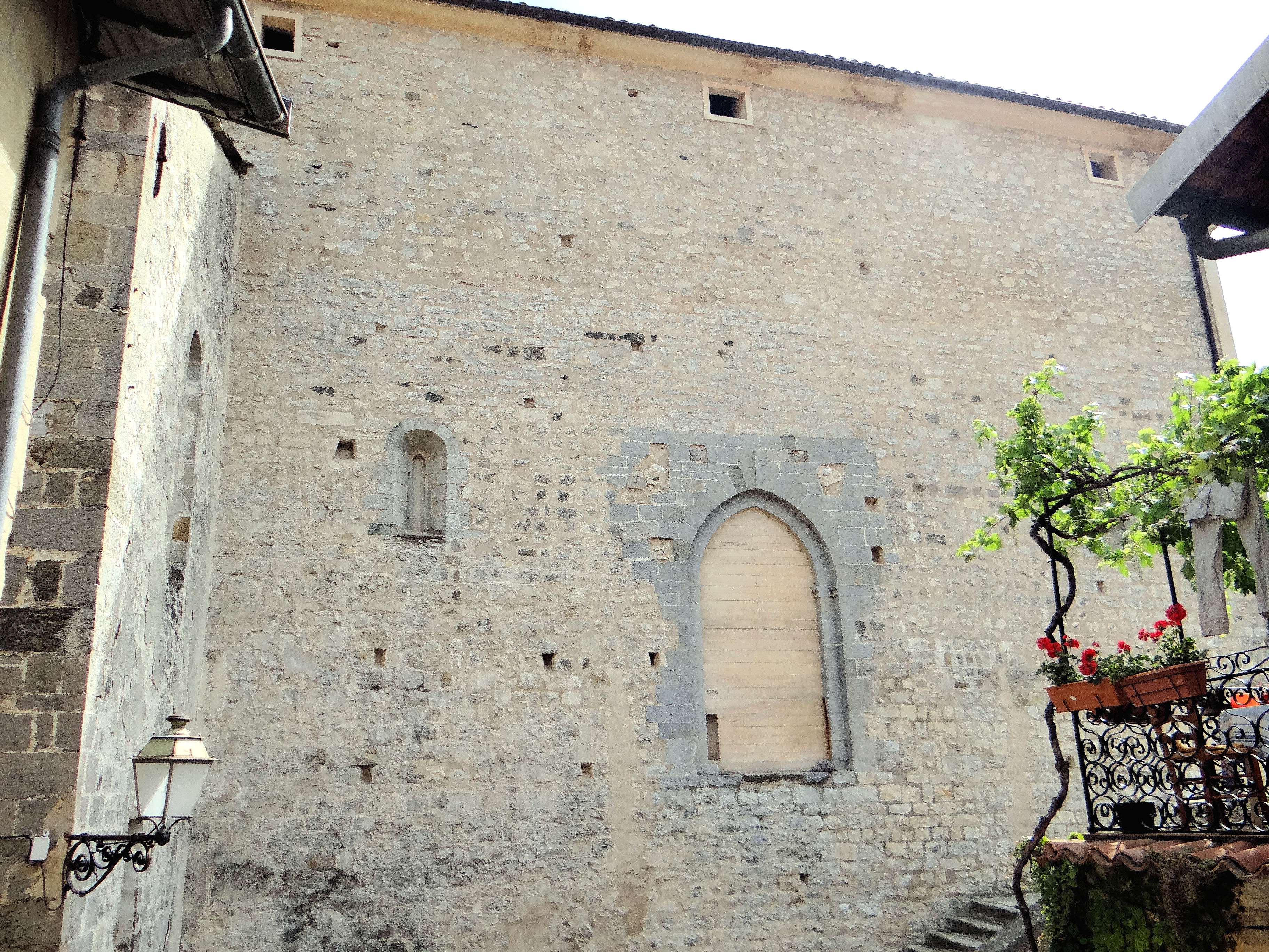 Enceinte de Lucéram - Ancien mur du château pris dans le mur nord de l'église